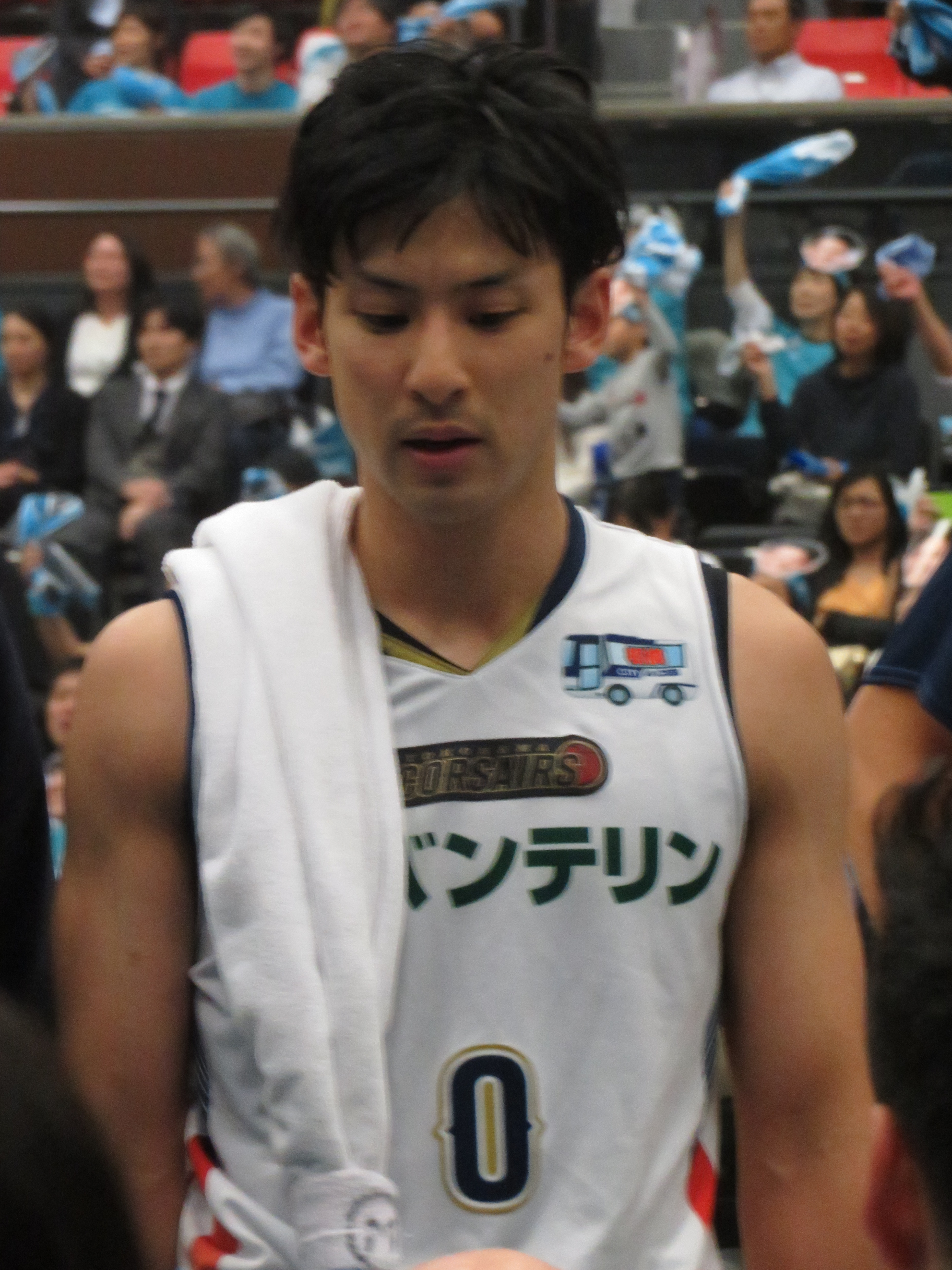 2018年10月12日撮影 2018-19 B1 第二節 京都-横浜 ハンナリーズアリーナ